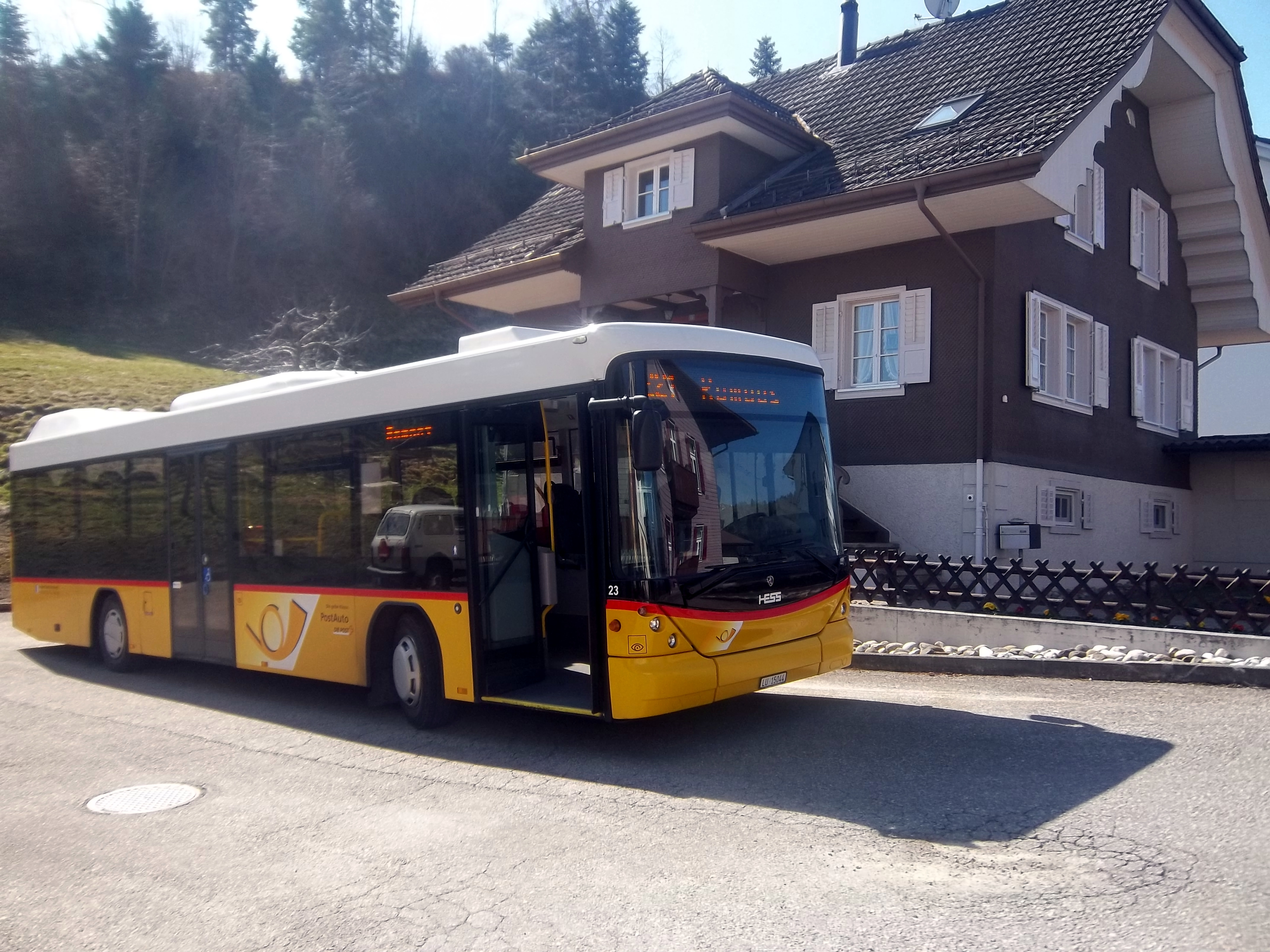 Ómnibus de la compañía Die Post que une las comunas de Wolhusen y Romoos, en el Cantón de Lucerna (Suiza).